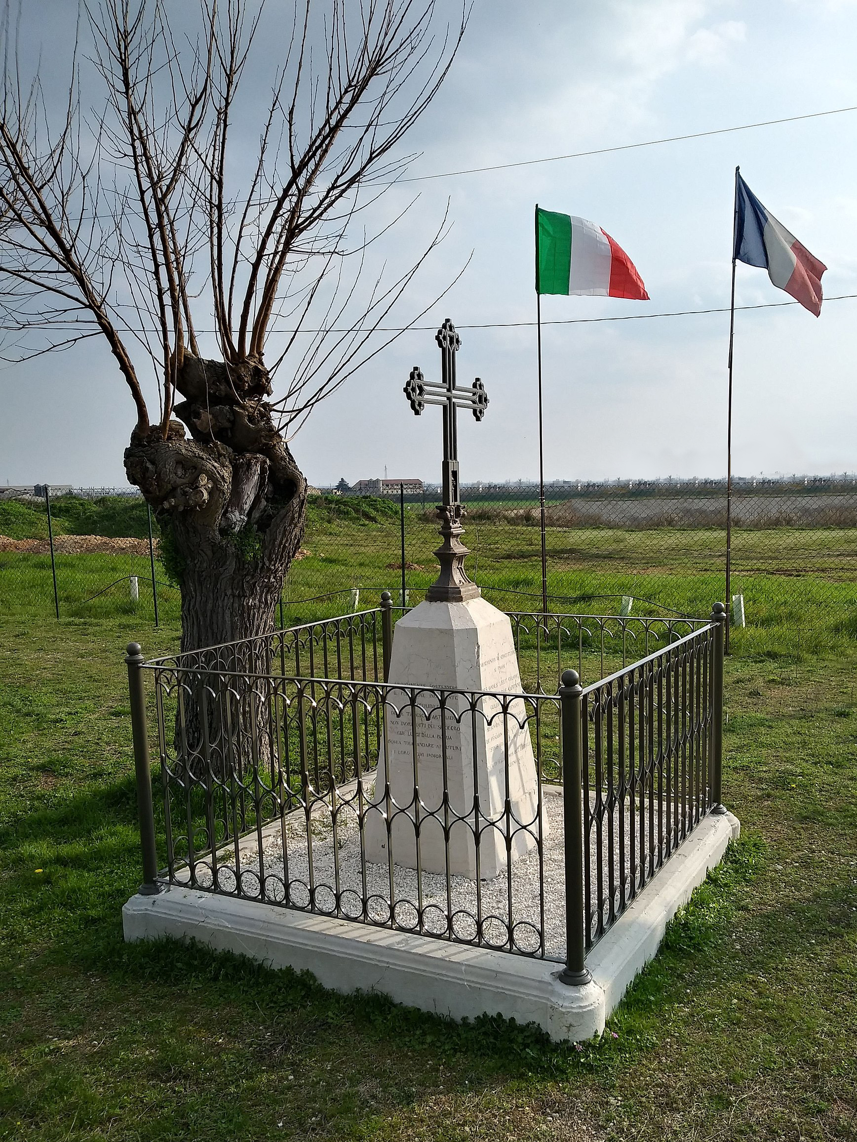 Tomba d'onore per gli ufficiali del 1º reggimento Cacciatori d'Africa e del 5º reggimento Ussari, caduti nella Battaglia di Medole, a Ca' Fattori, Medole - Restauro 2018